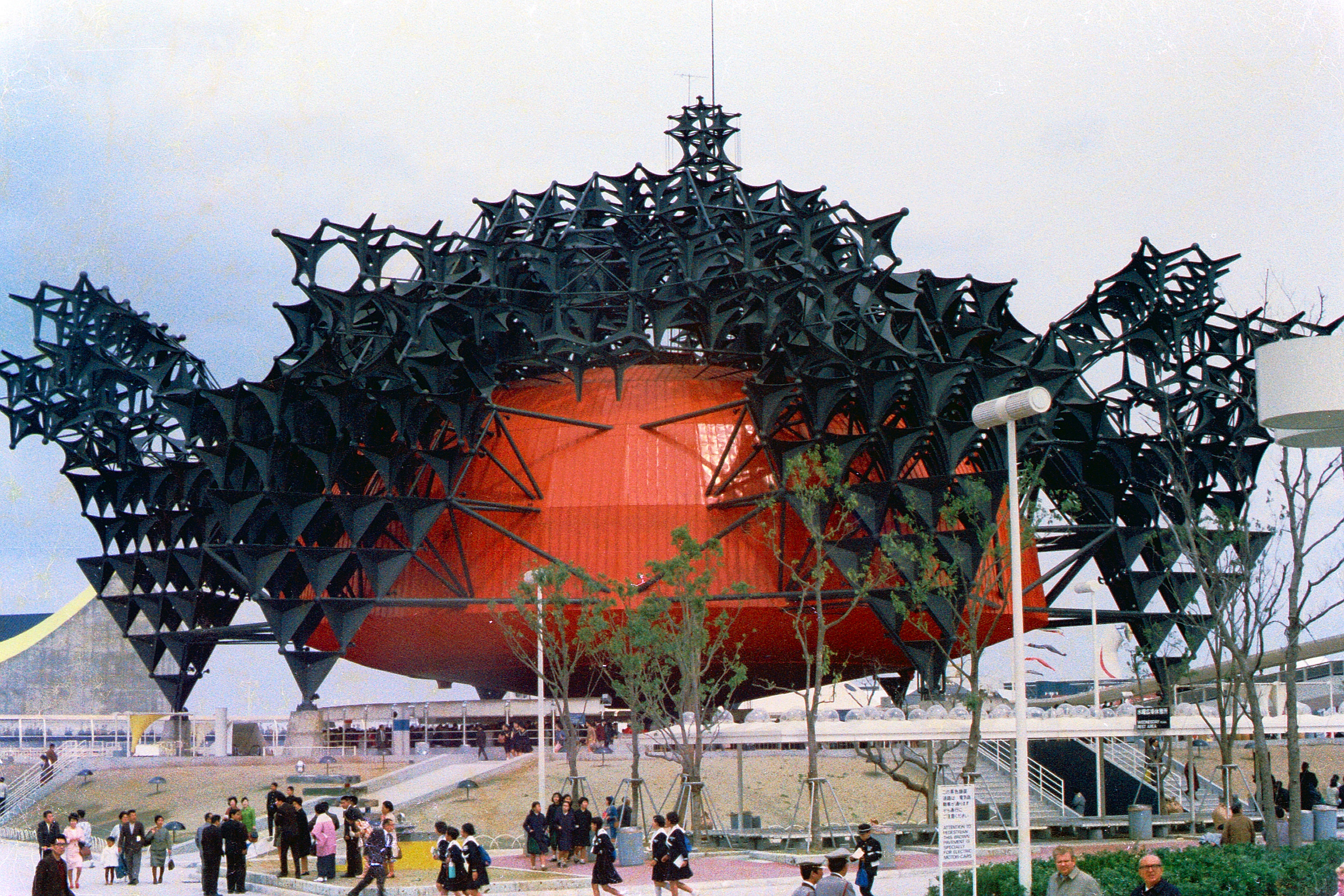 Toshiba-IHI Pavilion, Osaka Expo'70. April 1970.